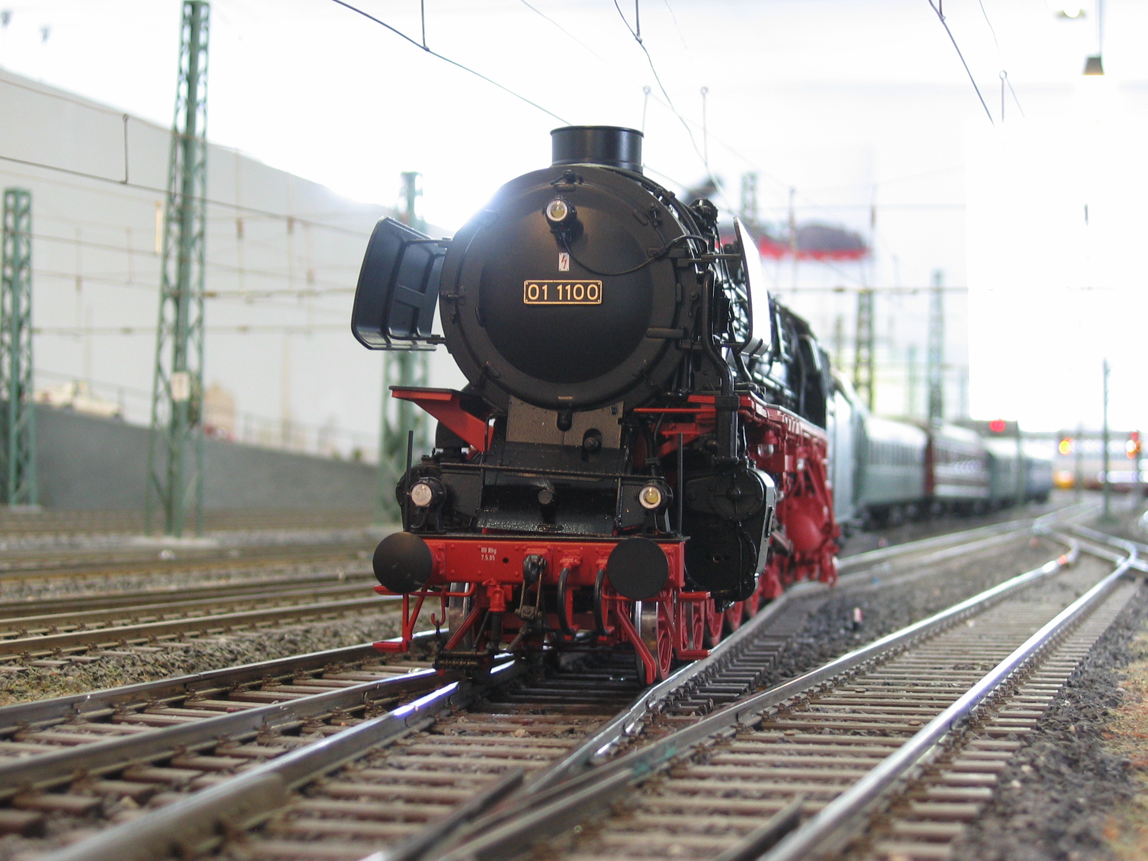 Modelleisenbahn im Museum für Hamburgische Geschichte - Harburg